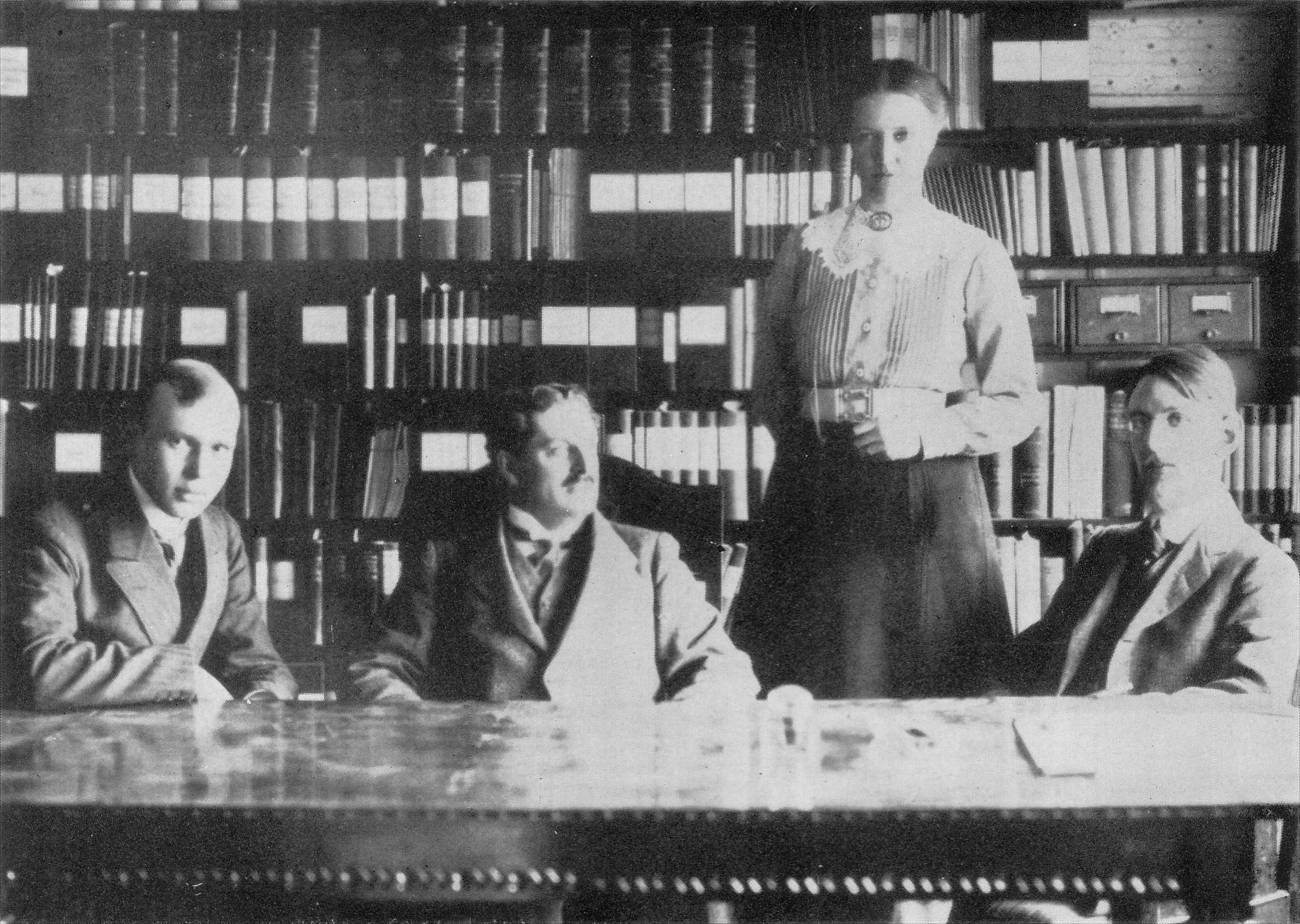 Stadsförbundets_kansli_1910 Från vänster: Helge Lindholm, Erik Palmstierna, Anna Wager Gunnarsson och Yngve Larsson.